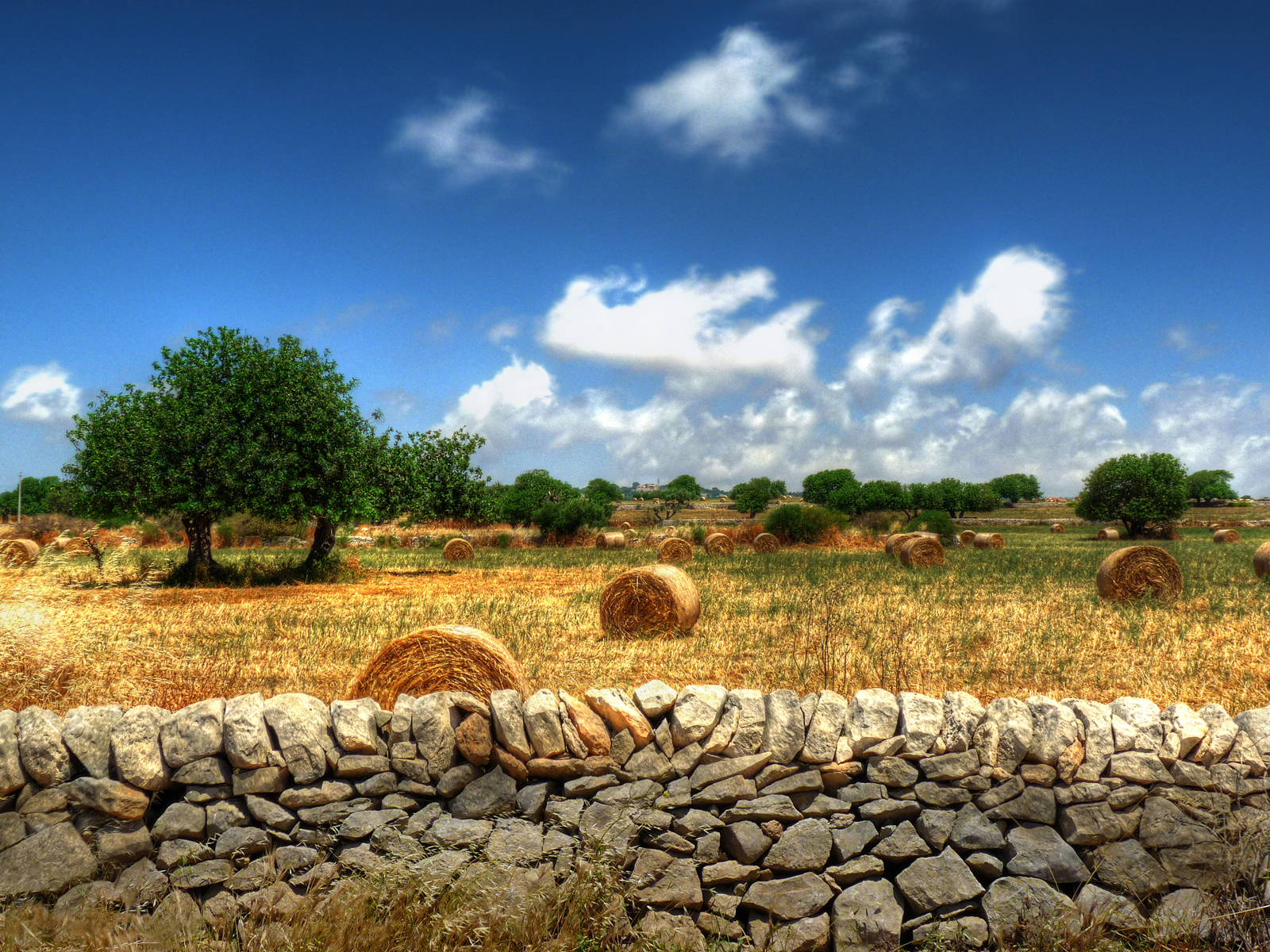 Foto scattata da Giorgio Leggio - Scorcio di campagna ragusana